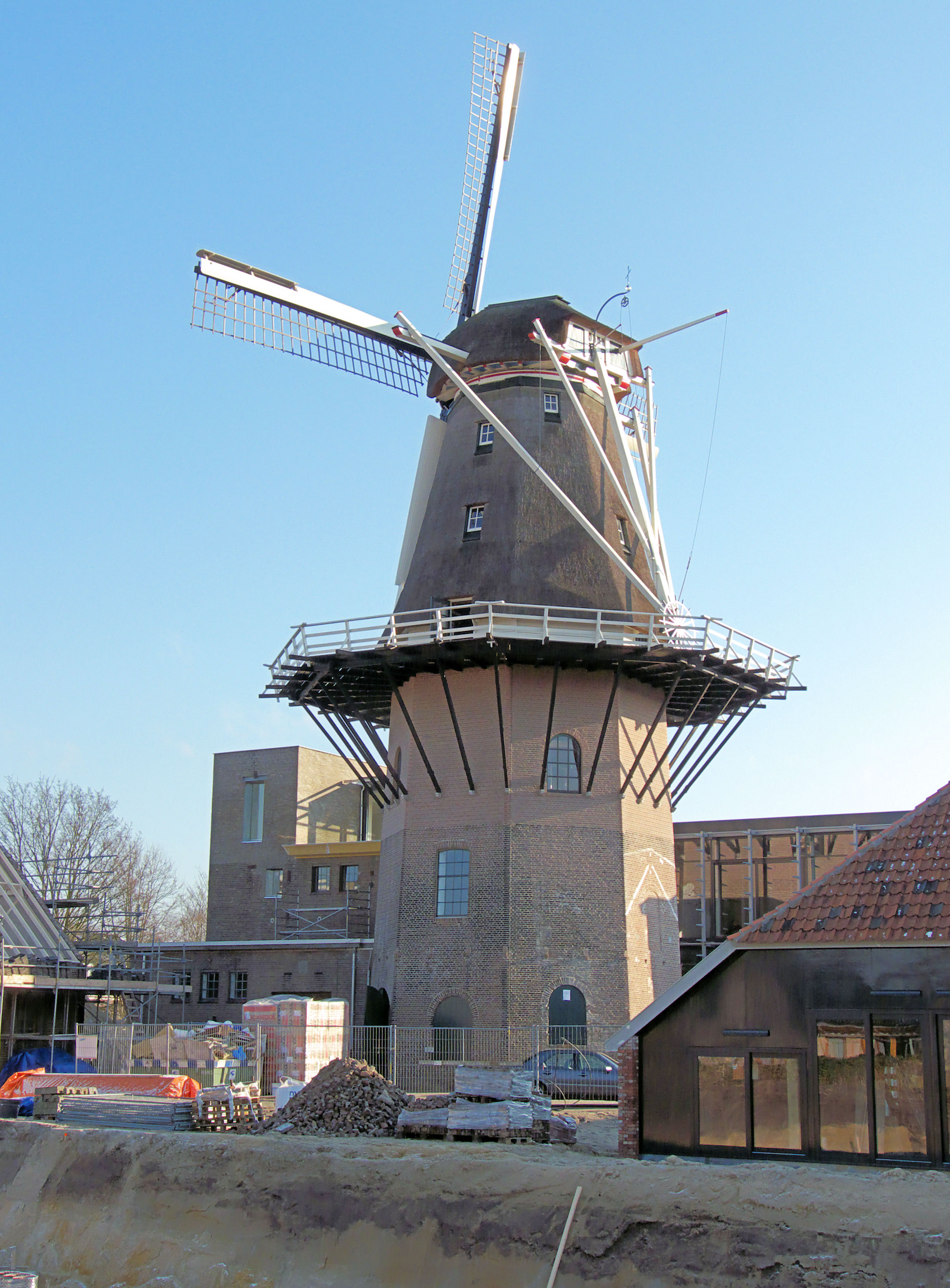 Concordia molen, Ede